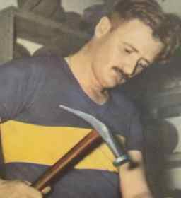 El futbolista Uruguaià del Boca Juniors, Javier Ambrois, a la portada de "El Gráfico" 2017.